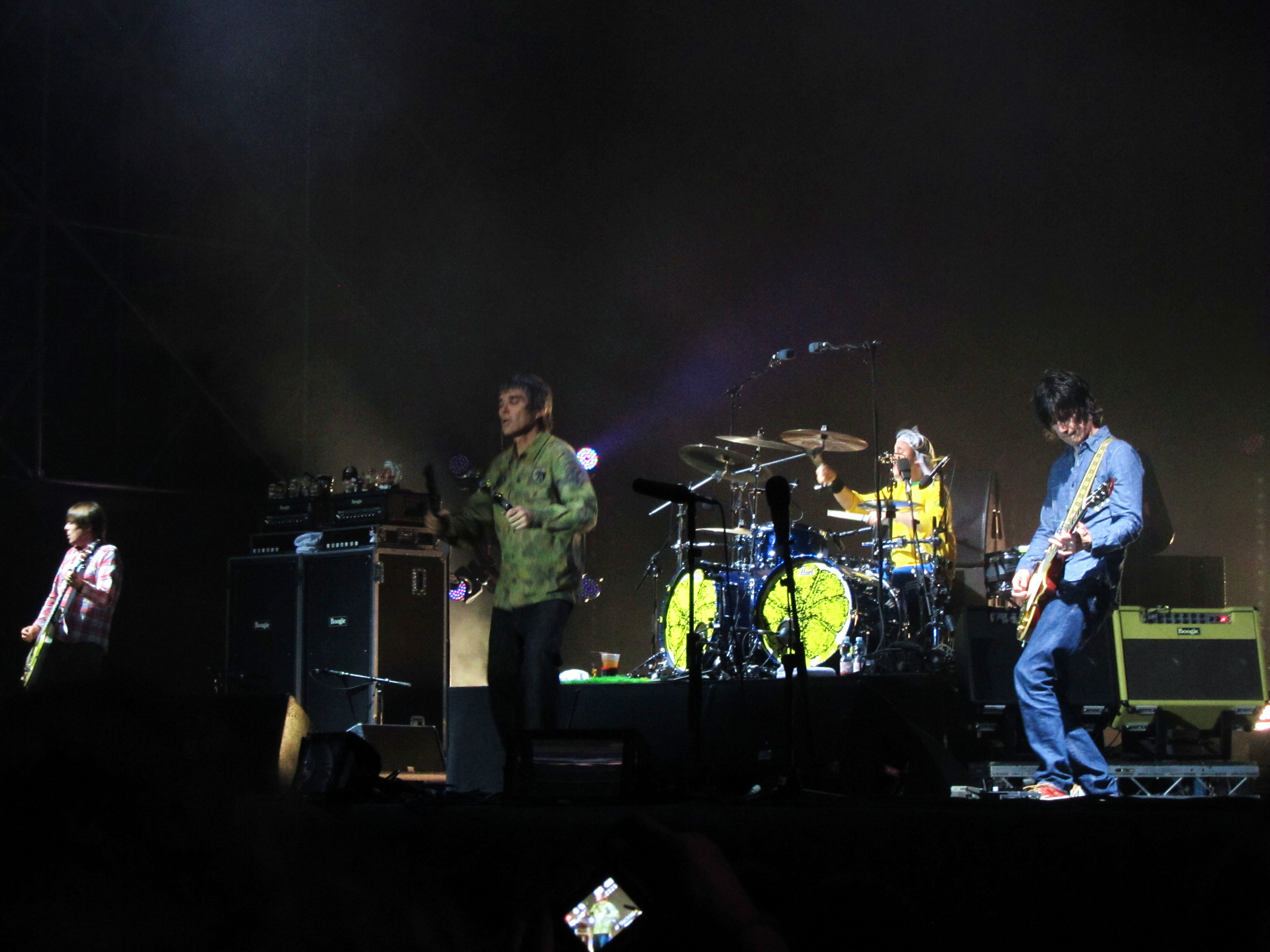 Stone Roses in concerto 17 luglio 2012 all'Ippodromo di Milano